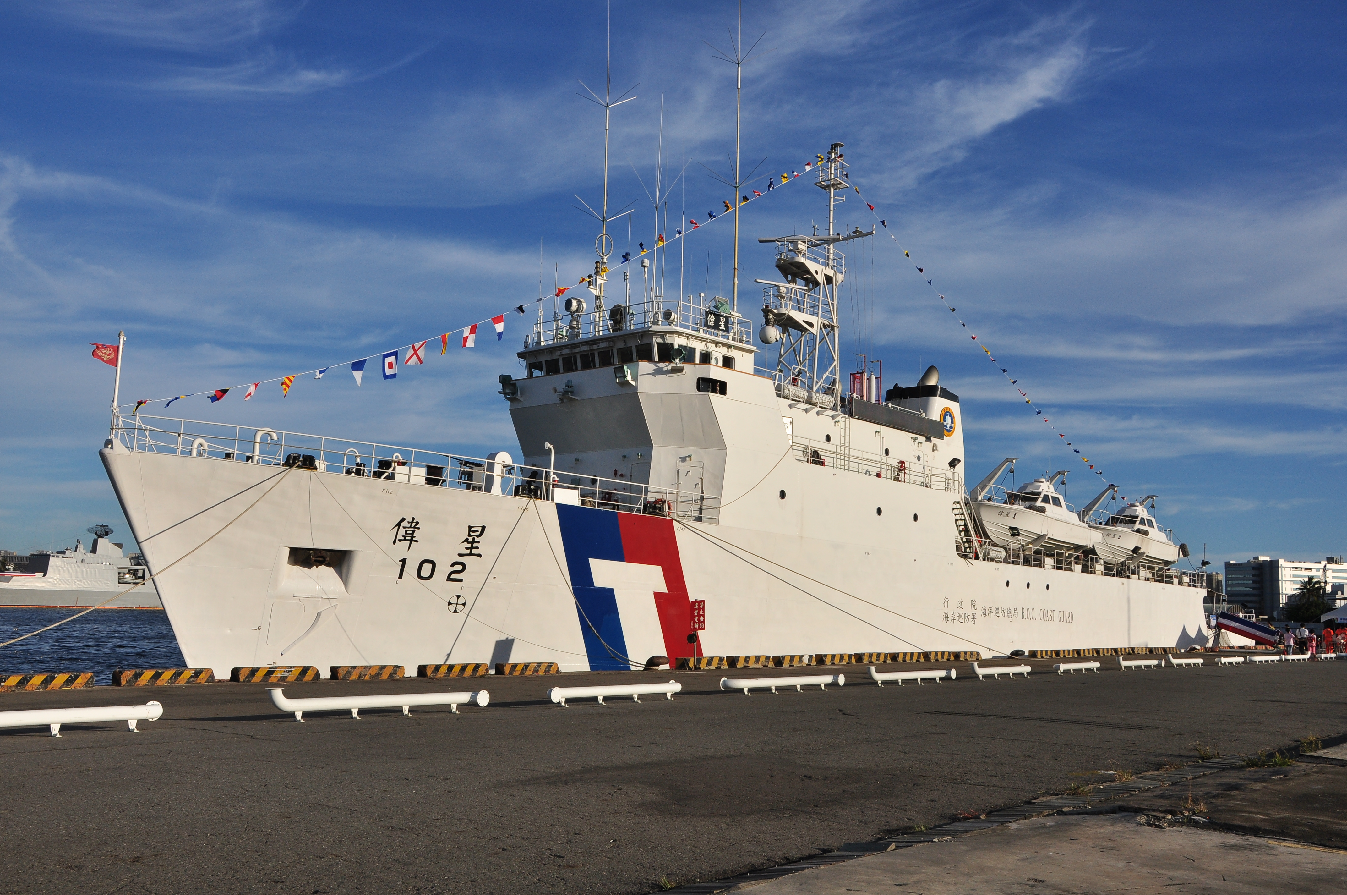 中華民國行政院海岸巡防署偉星艦